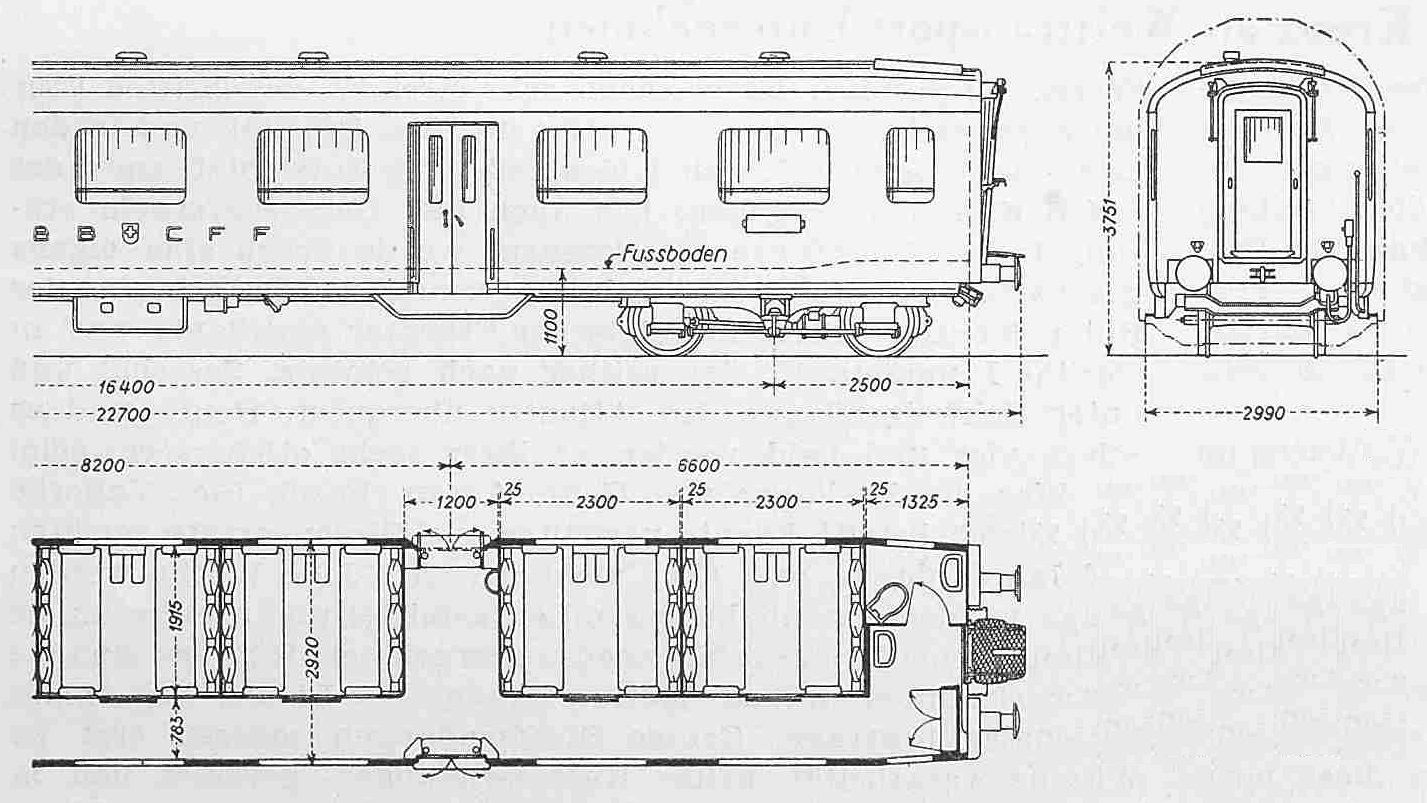 Typenskizze des Erst-/Zweitklass-Abteilwagen, erbaut von SIG